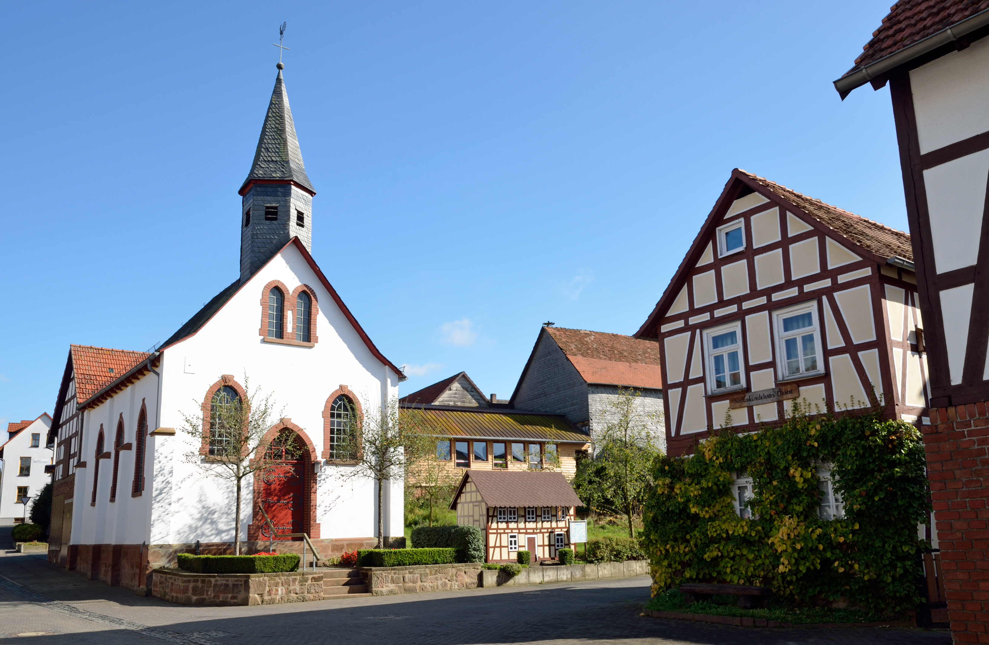 Kirche und Naturkundehaus Damm (Lohra)